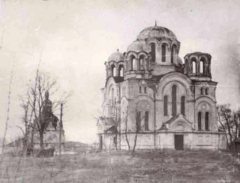 Анастасіївська каплиця та Храм Трьох Анастасія (південний фасад)